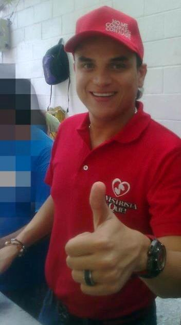 Silvestre Dangond con la camisa de no me compares con nadie